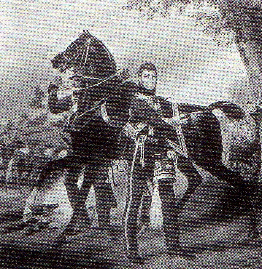 César-René-François-Rodolphe de Vachon, comte de Belmont-Briançon. Chambellan de l'Empereur et colonel-major du 3e régiment de gardes d'honneur, il est tué à la tête de son régiment pendant la bataille de Reims (13 mars 1814)